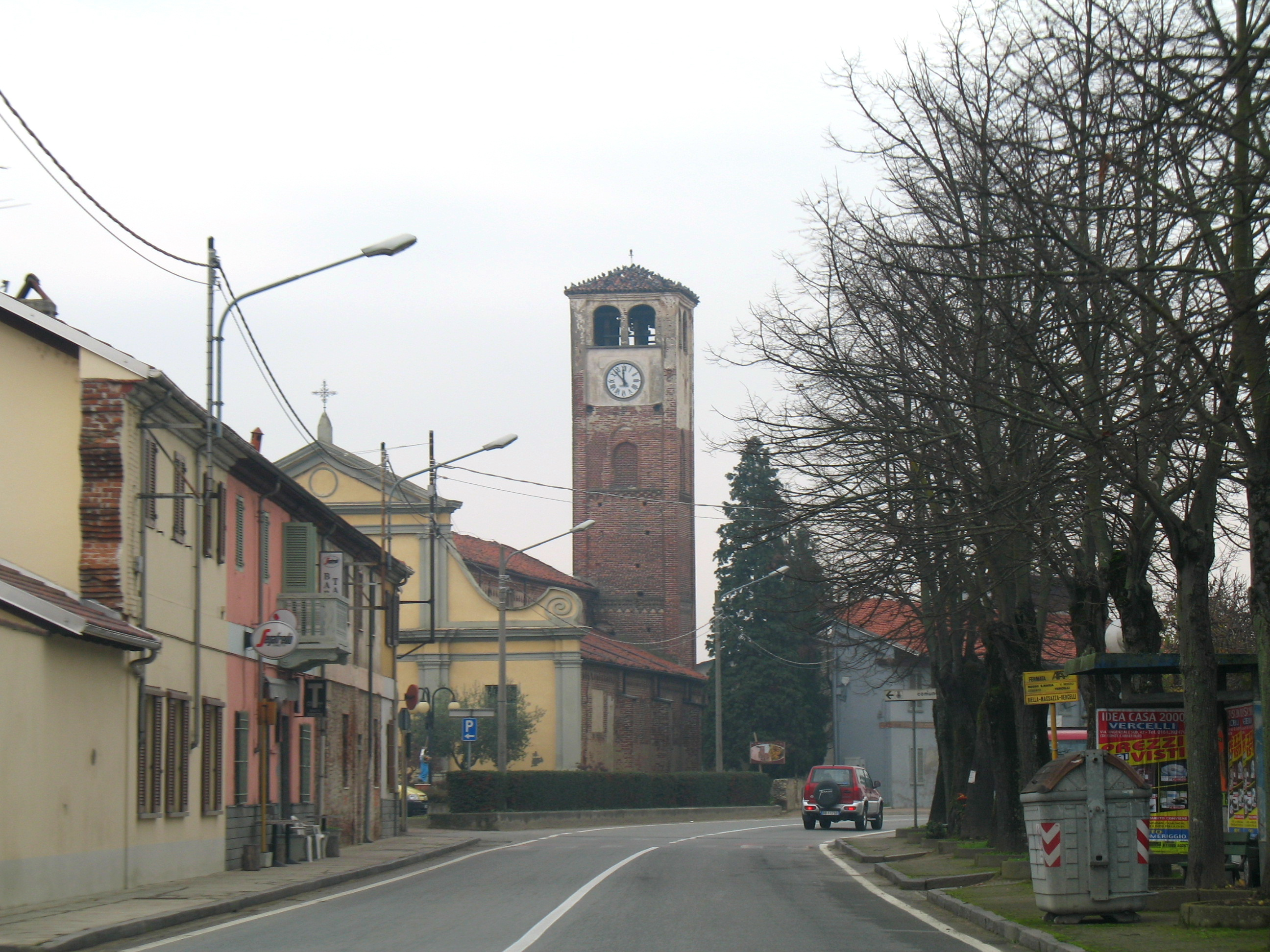 Collobiano (provincia di Vercelli) - Torre campanaria